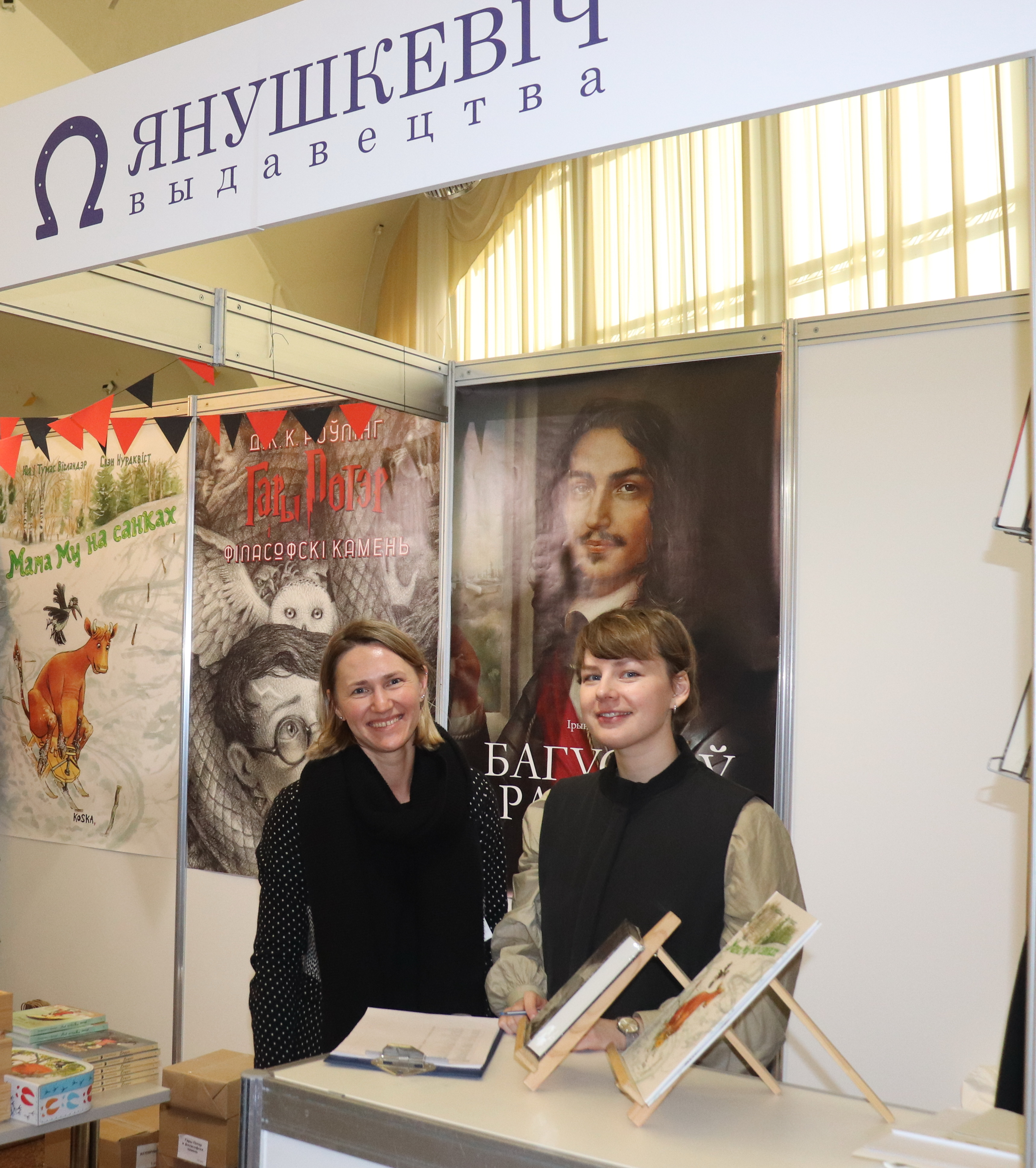 Стэнд выдавецтва «Янушкевіч», XXVII Мінская міжнародная кніжная выстава-кірмаш